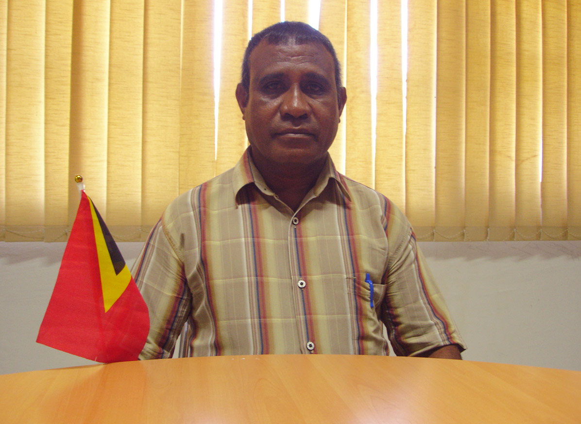 Basilio Ximenes, Administrator des Subdistrikts Laleia